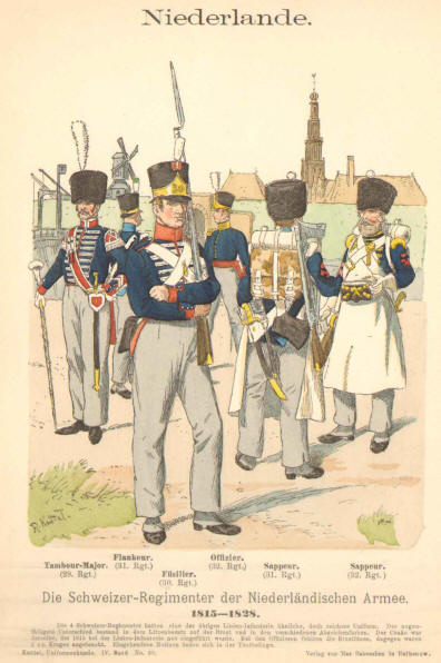 Die Schweizer Regimenter der Niederländischen Armee. 1815-1828. Offizier. (32. Regt.) Füsilier. (30. Rgt.) Flankeur. (31. Rgt.) Sappeur. (31. und 32. Rgt.) Tambour - Major. (29 Rgt.). Altkolorierte Zinkographie von Richard Knötel.